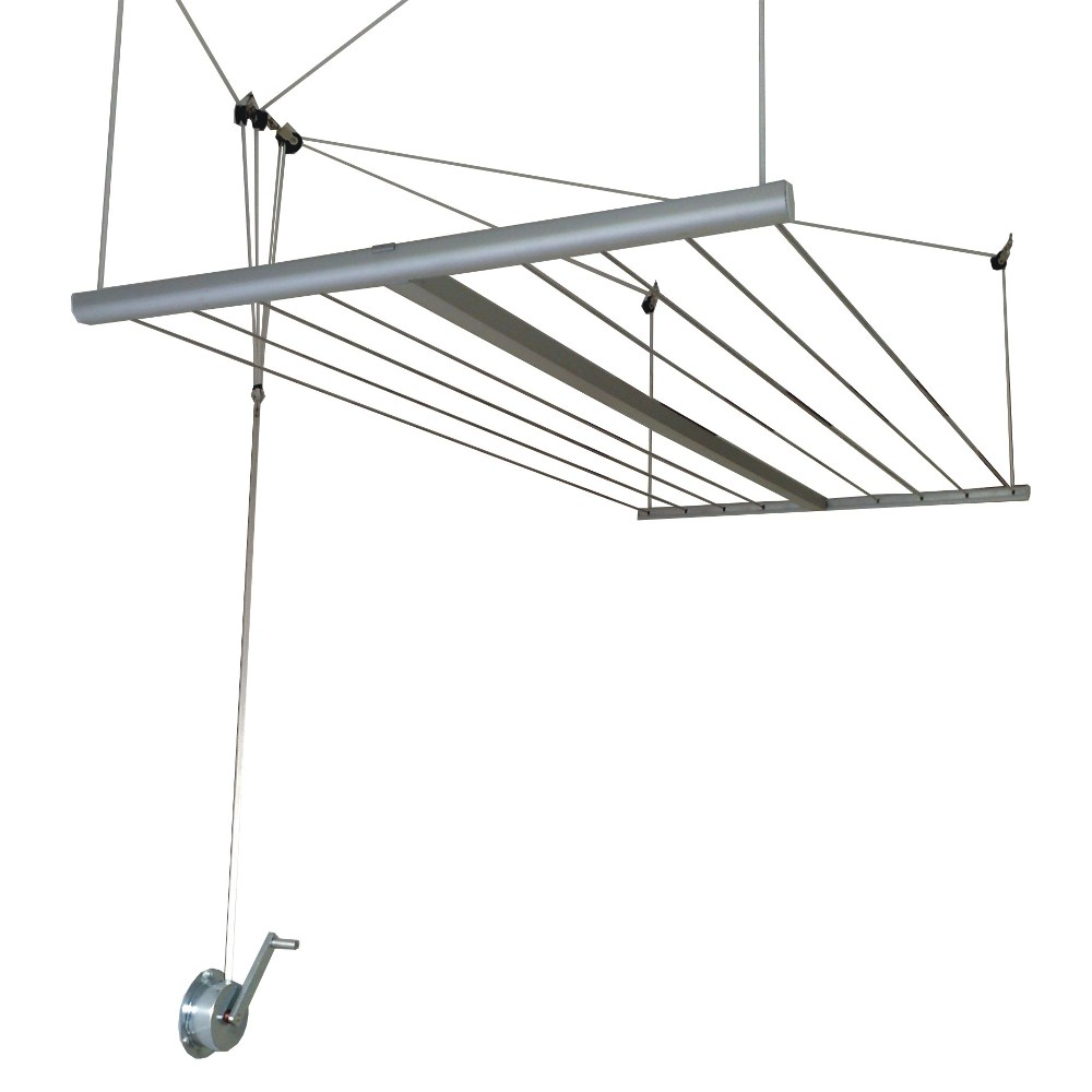 Tendedero levadizo colgante de techo para tender y secar ropa en interiores